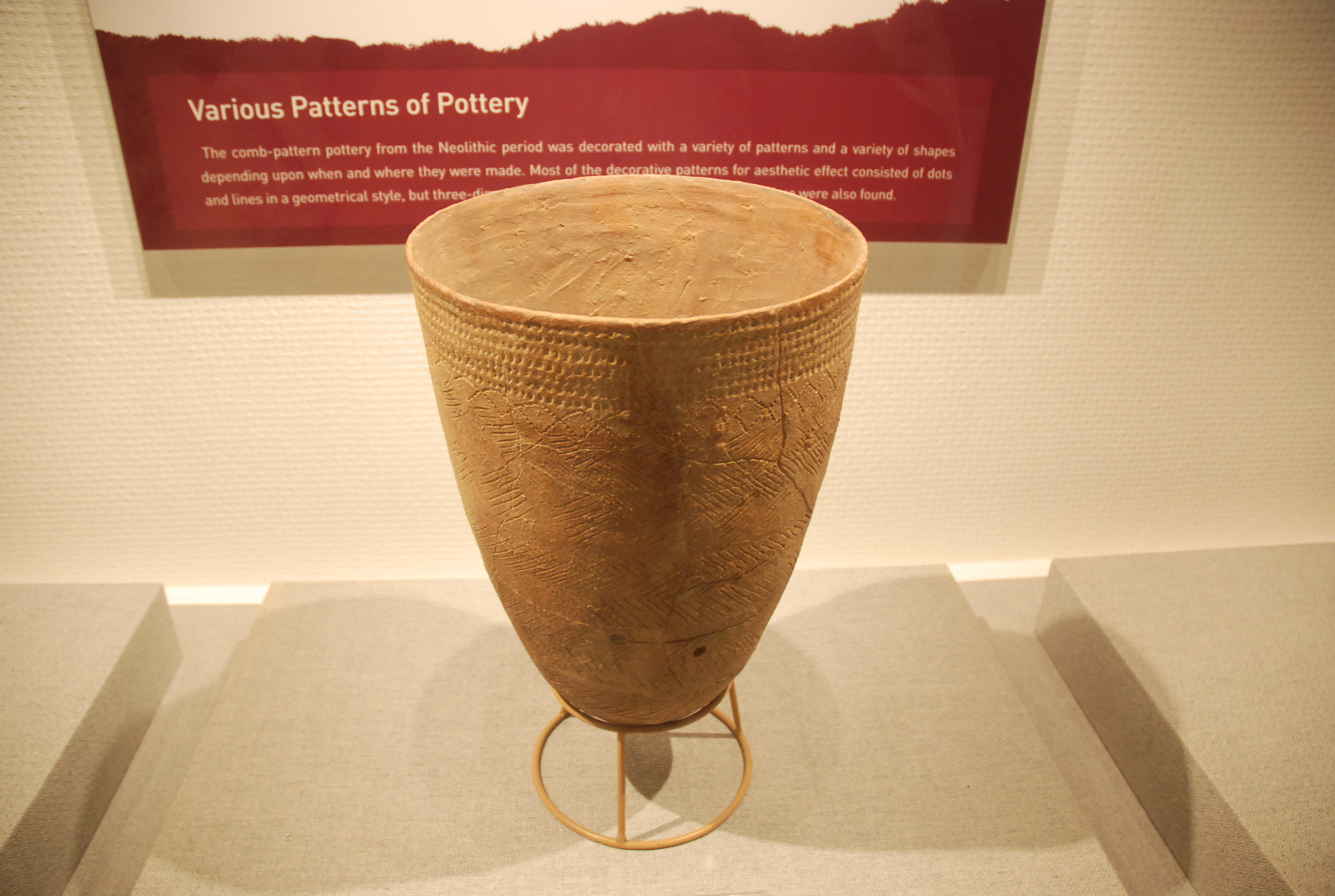 빗살무니 토기(암사동)